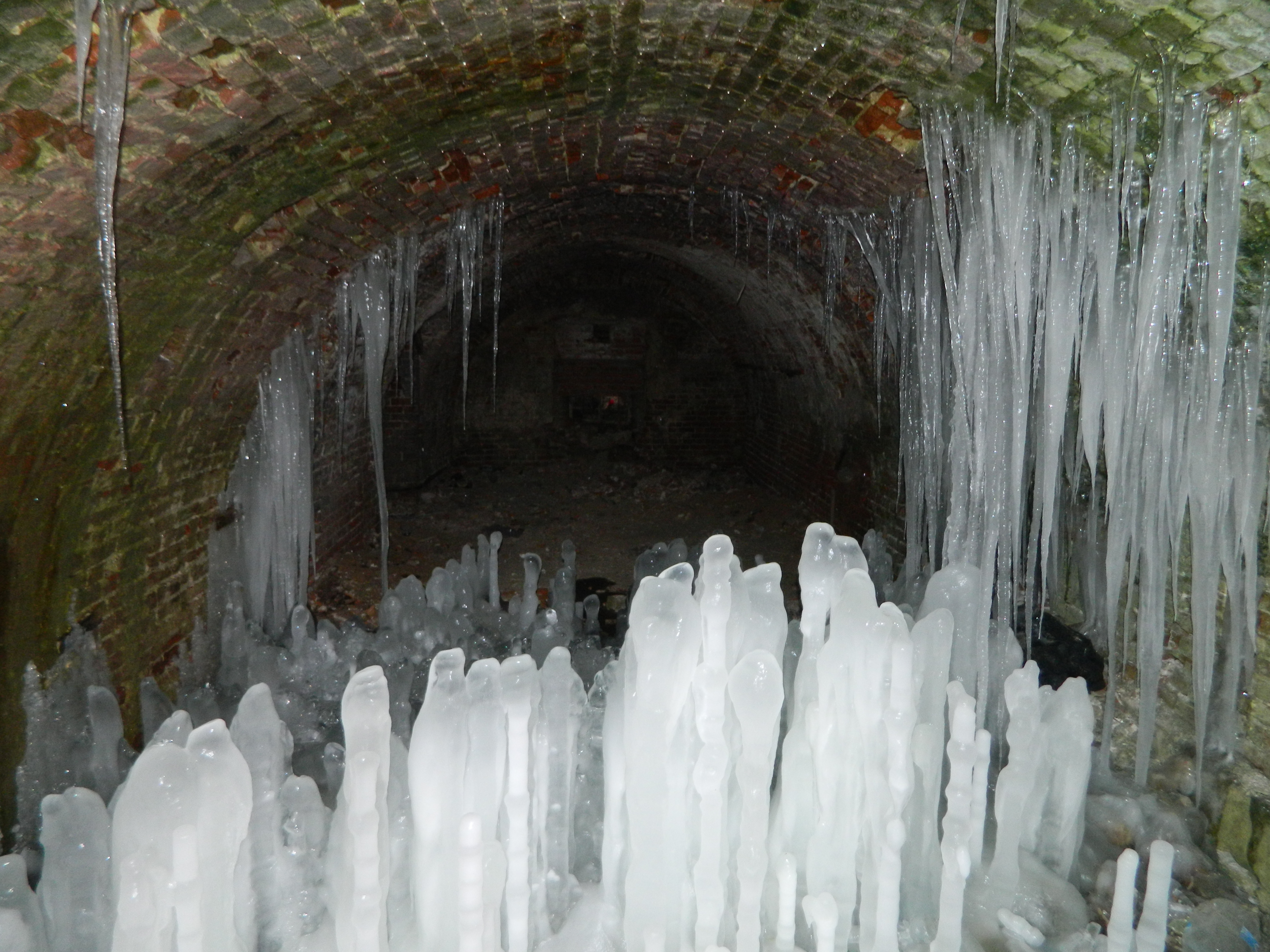 Внутри моста кремля